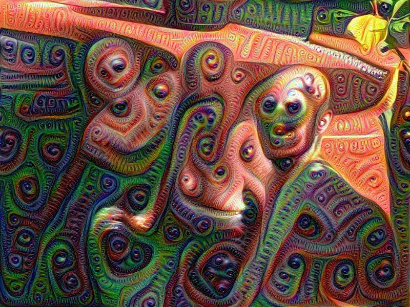 Deep Dreamscope